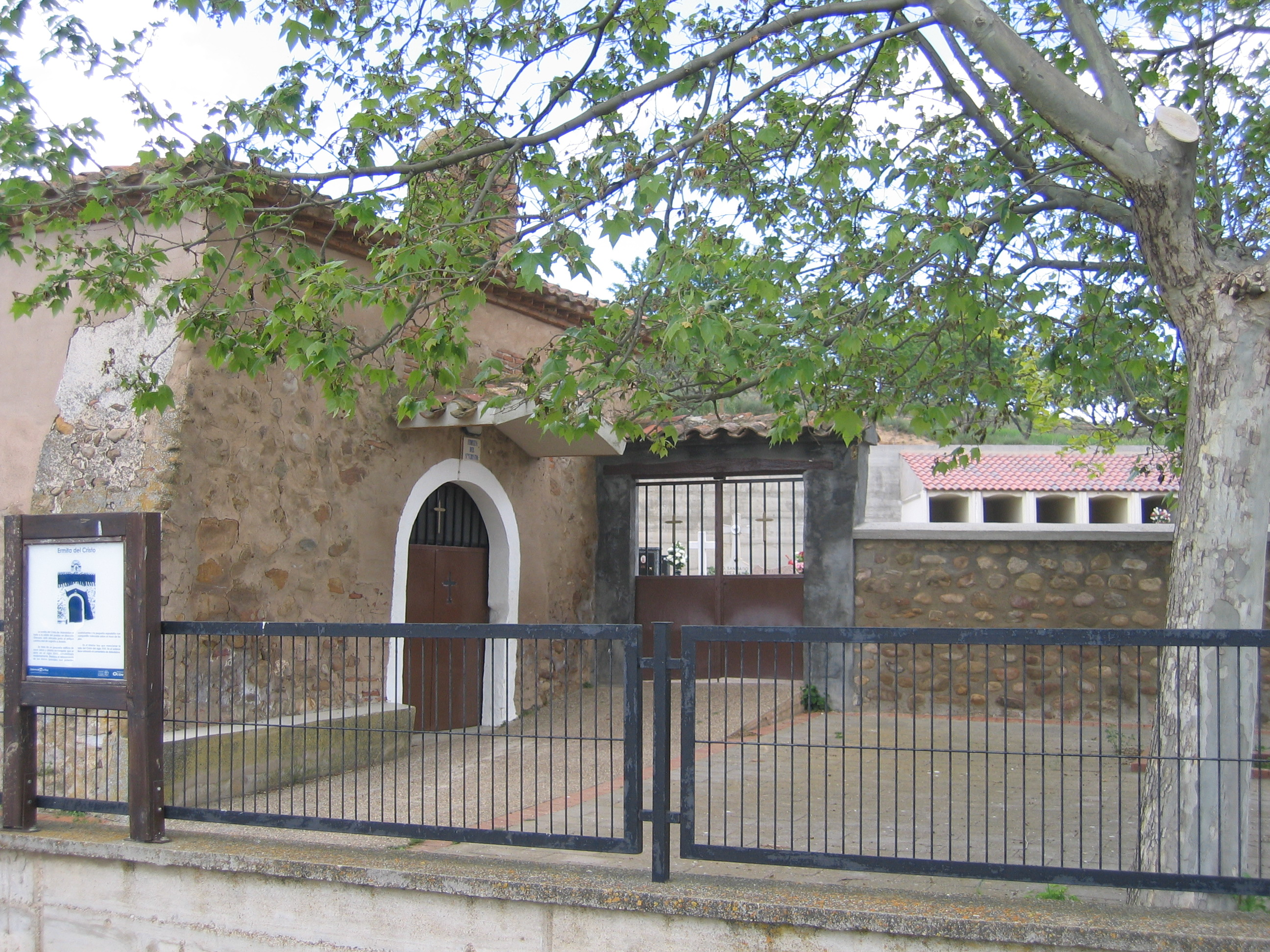 Ermita del Cristo y cementerio de Aldealobos